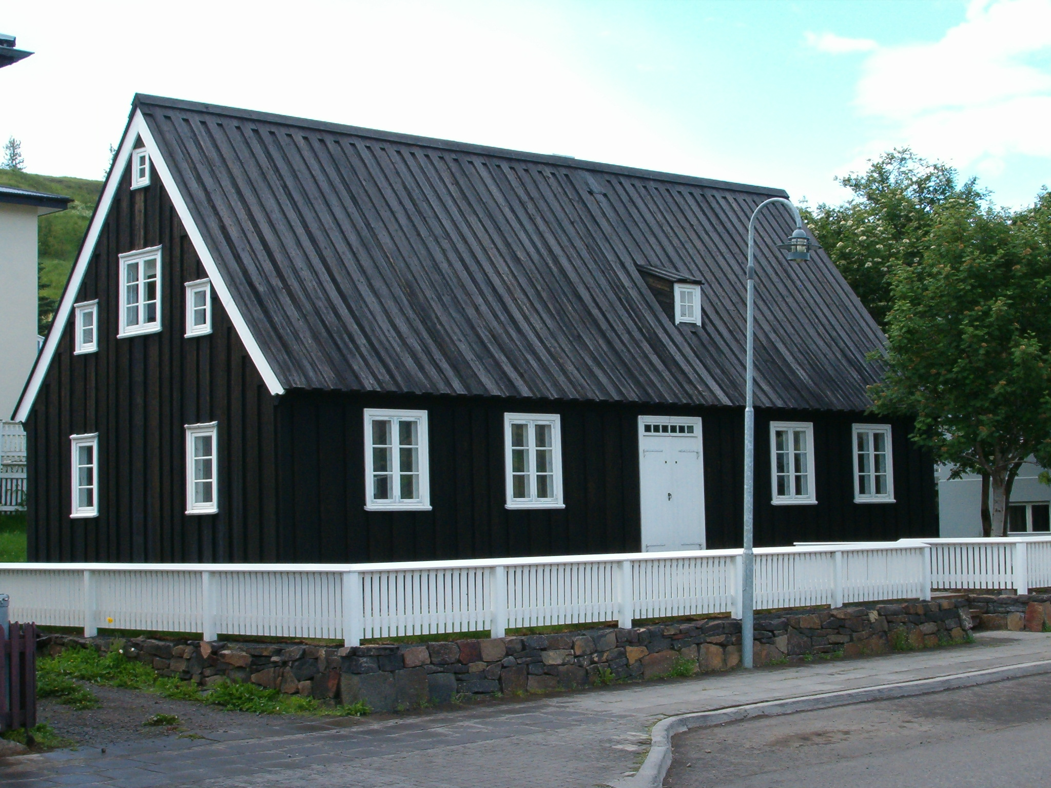 Laxdalshú